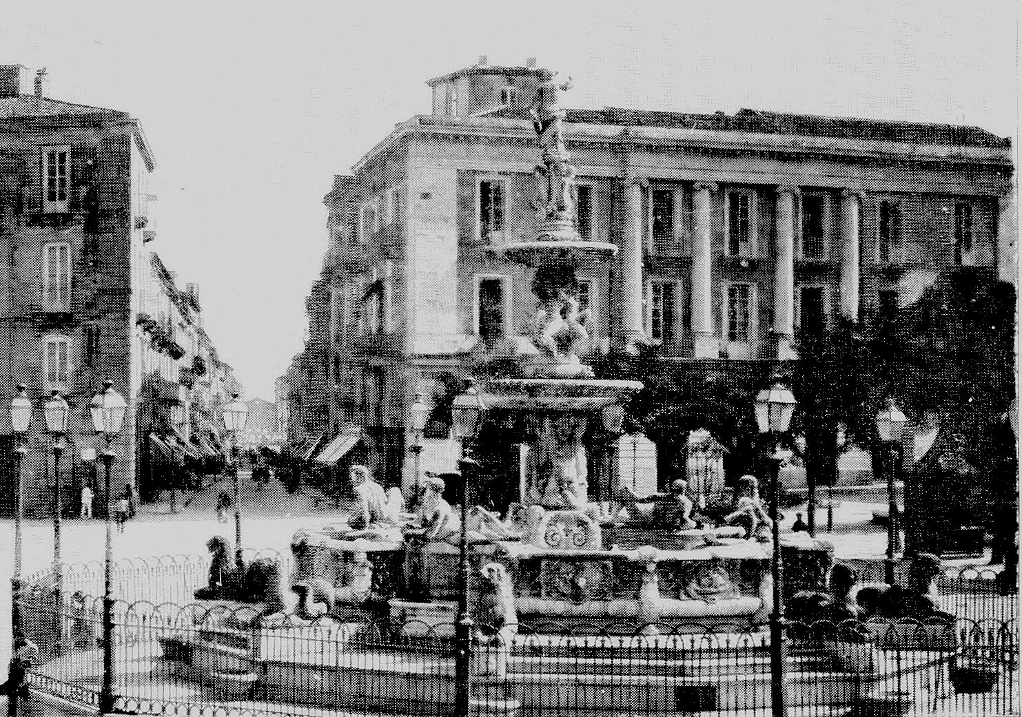 palace